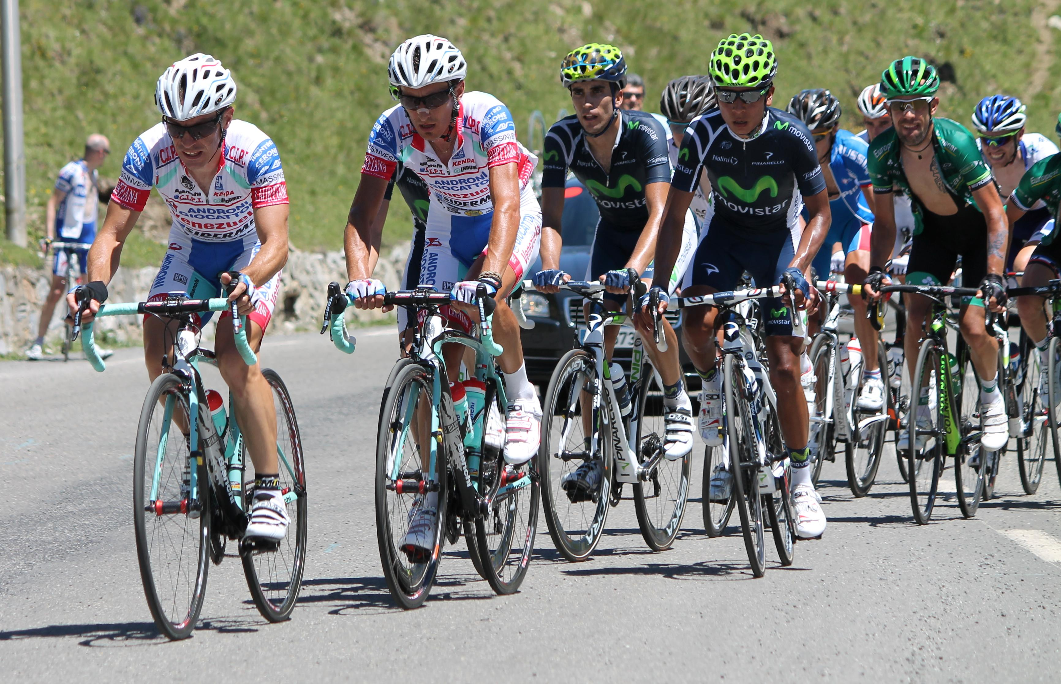 Emmanuelle Sella, Franco Pellizotti, Sergio Pardilla, Nairo Quintana et Anthony Charteau mènent le peloton des favoris dans le col du Tourmalet, peu après La Mongie, lors de l'édition 2012.